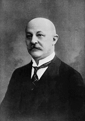 František Vážný (1868 - 1941), Český právník a soudce.